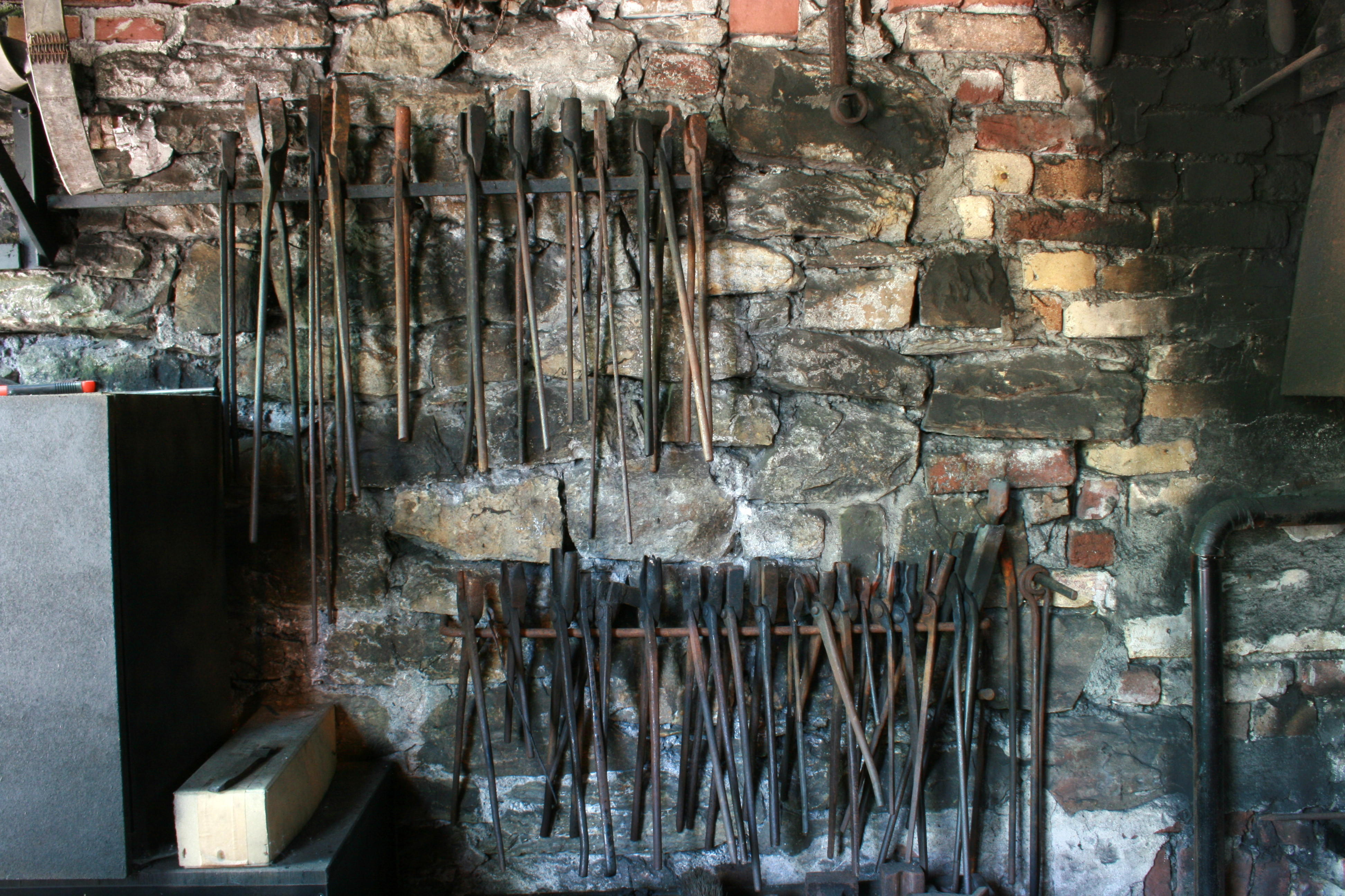 Bremecker Hammer in Lüdenscheid